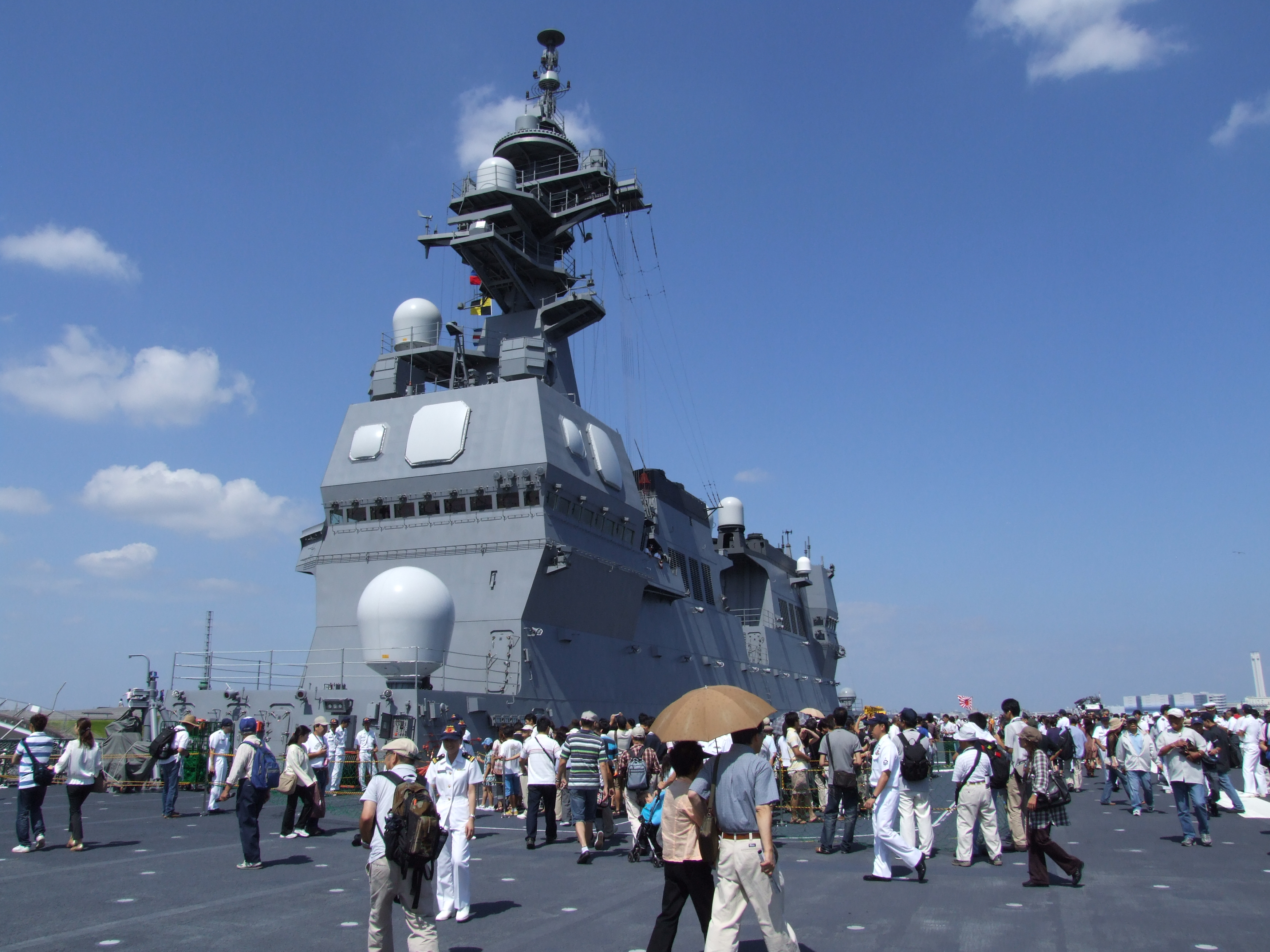 護衛艦ひゅうがの艦橋 Fujifilm FinePix S9000